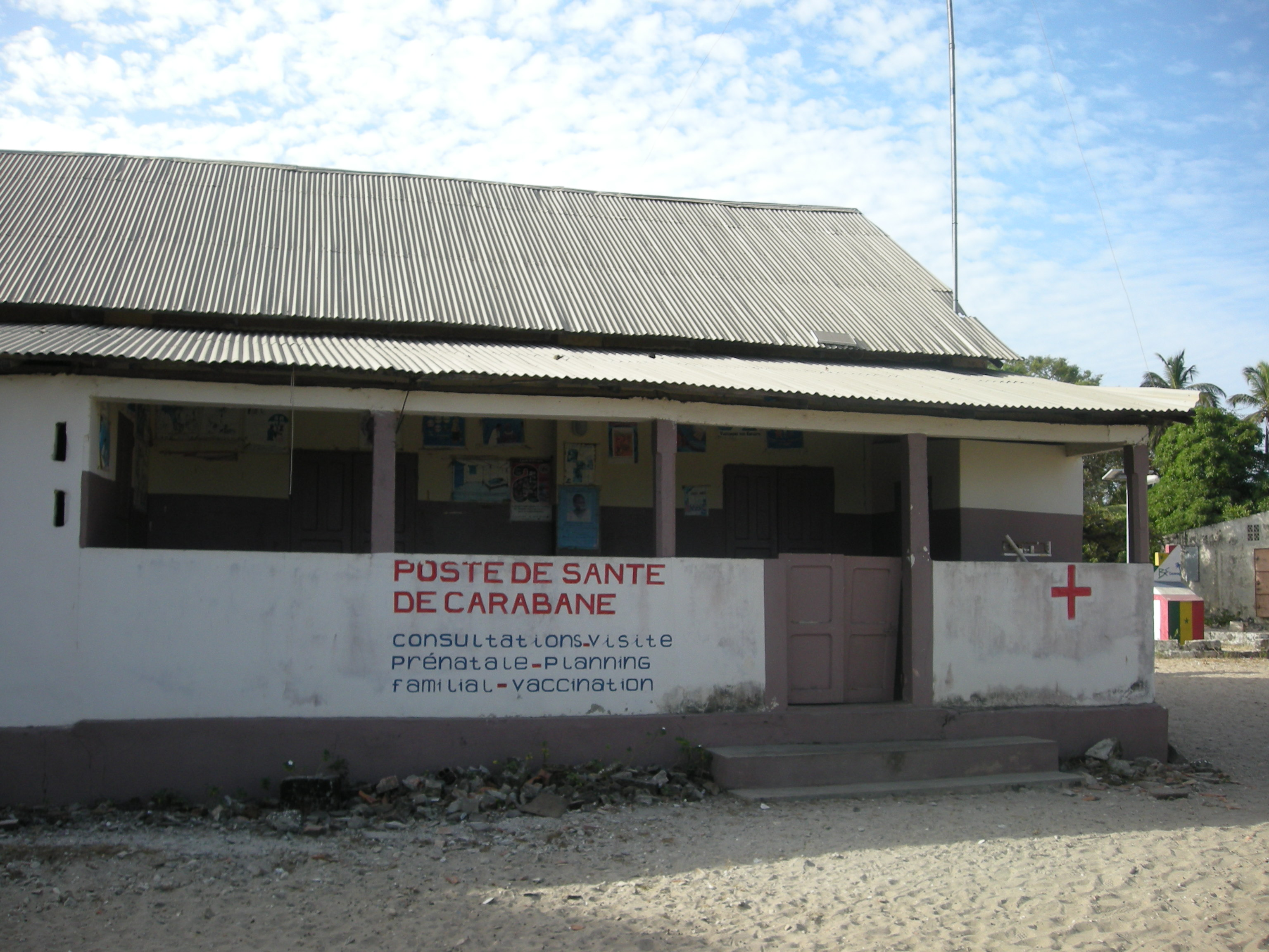 Poste de santé sur l'île de Carabane (Casamance, Sénégal)